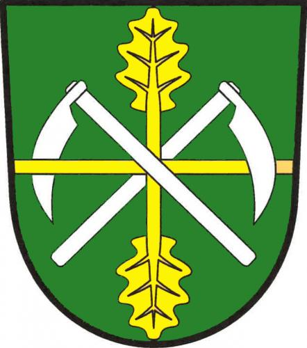 Seletice znak